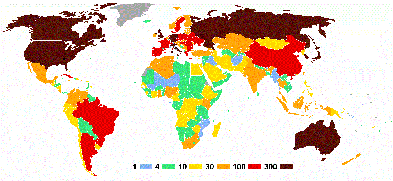 Olympische Sommerspiele 1996 — Anzahl der Athleten